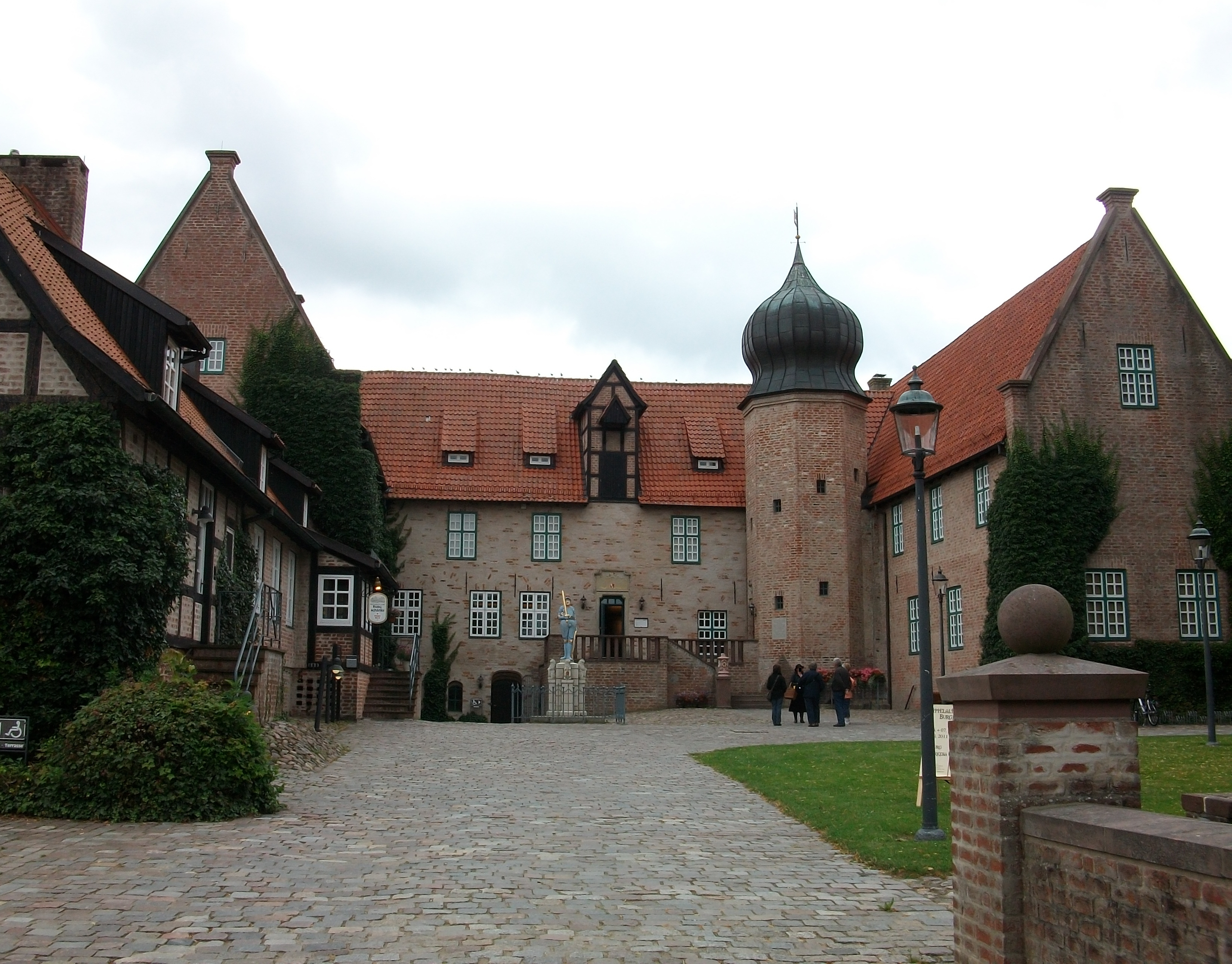 Burg Bederkesa in Bad Bederkesa (Germany)